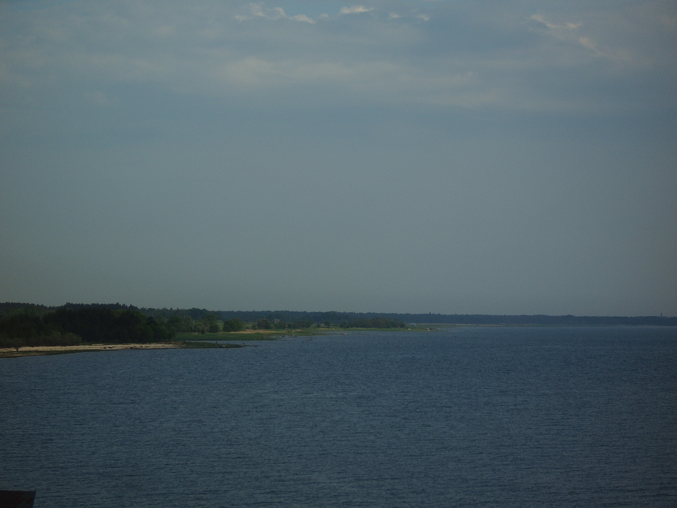 Muhu rannajoon, Suure Väina poolt pildistatud